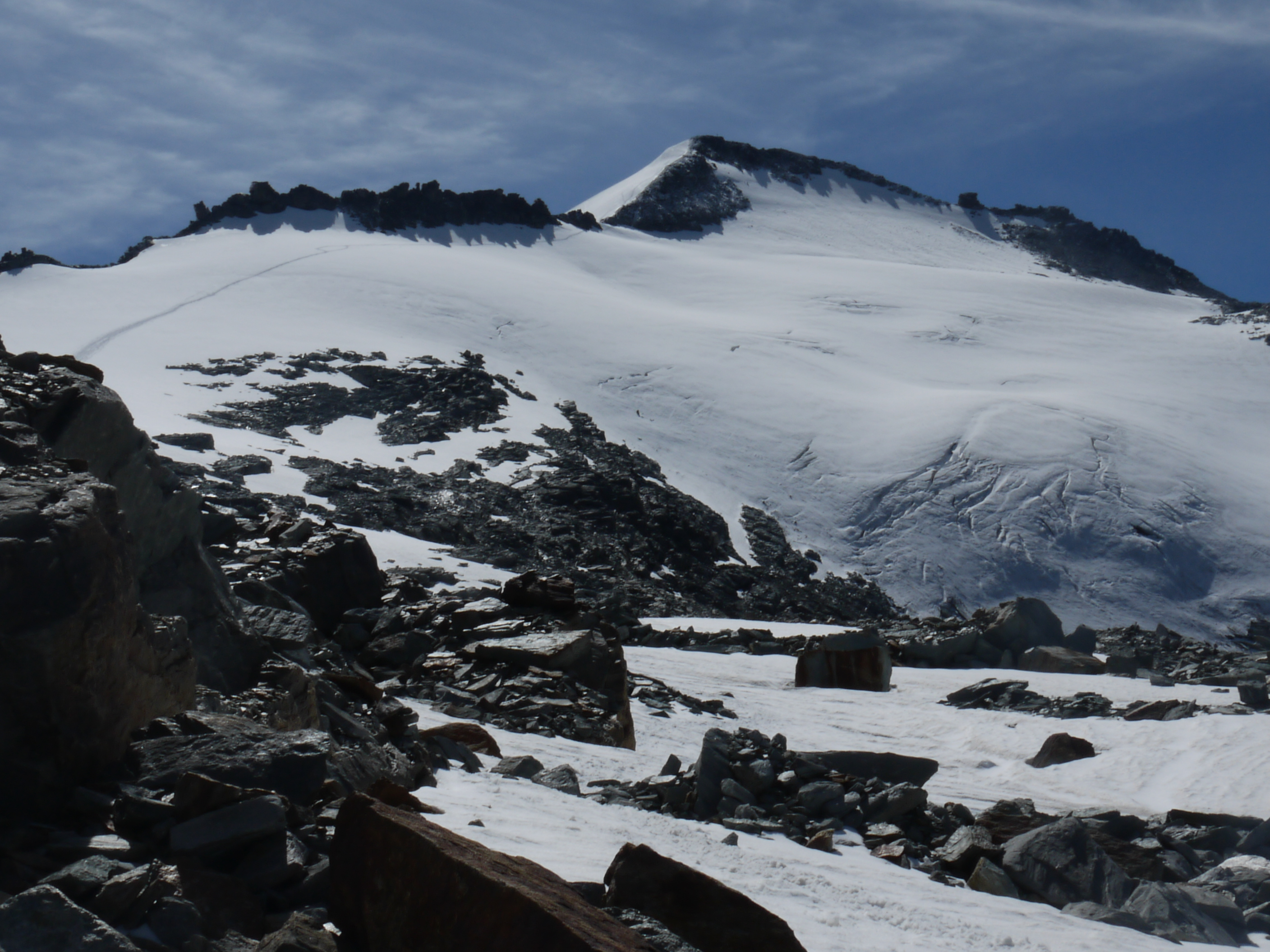 Das Rheinwaldhorn/Adula 3402m von NW aus gesehen (Normalroute von der Adulahütte